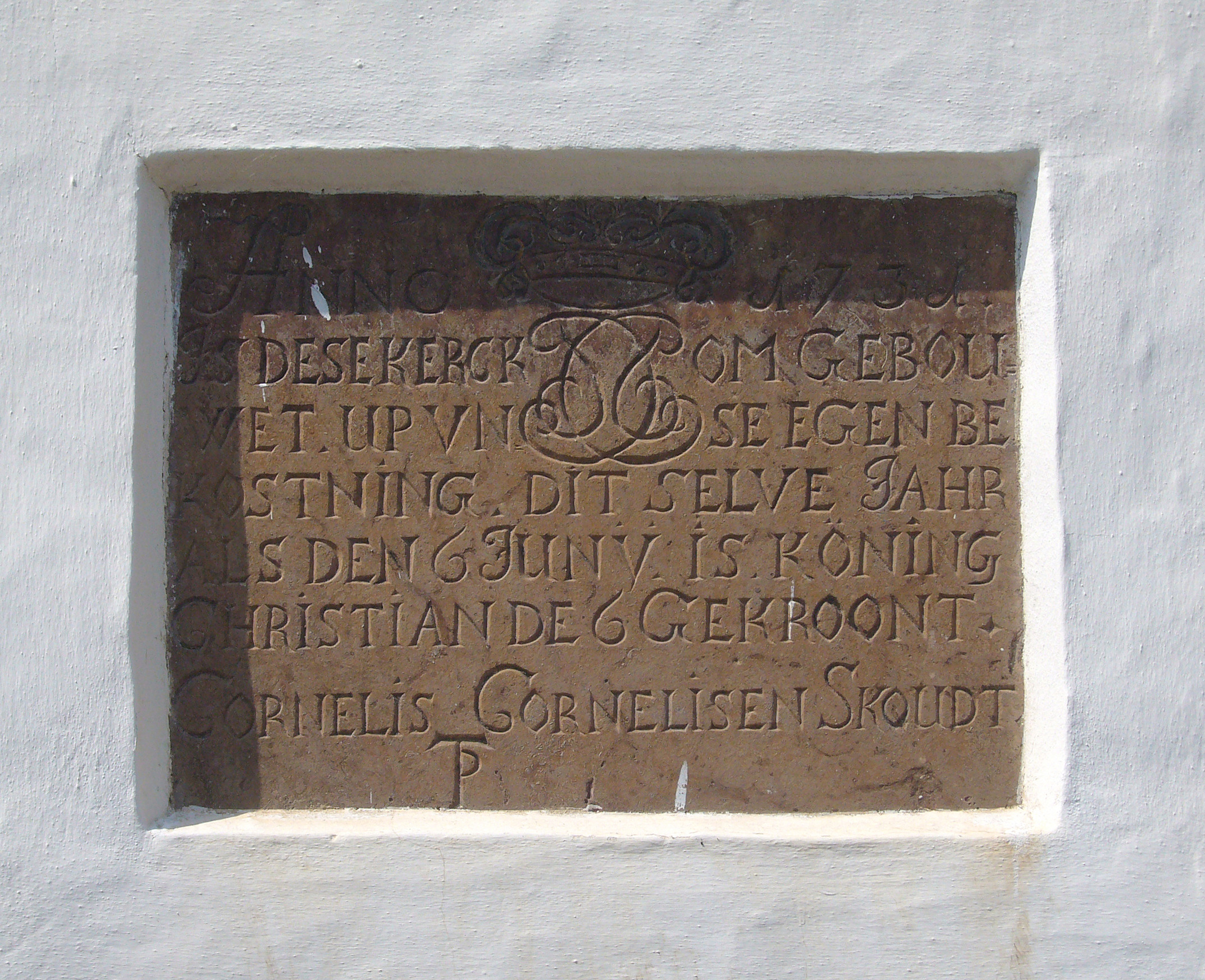 Store Magleby Kirke, Copenhagen, Denmark. Memorial for rebuild in 1731.The text reads: "Anno 1731 Is dese kerck omgebouwet up vnse egen bekostning. Dit selve jahr als den 6 Juny is köning Christian de 6 Gekroont. Cornelis Cornelisen Skoudt"